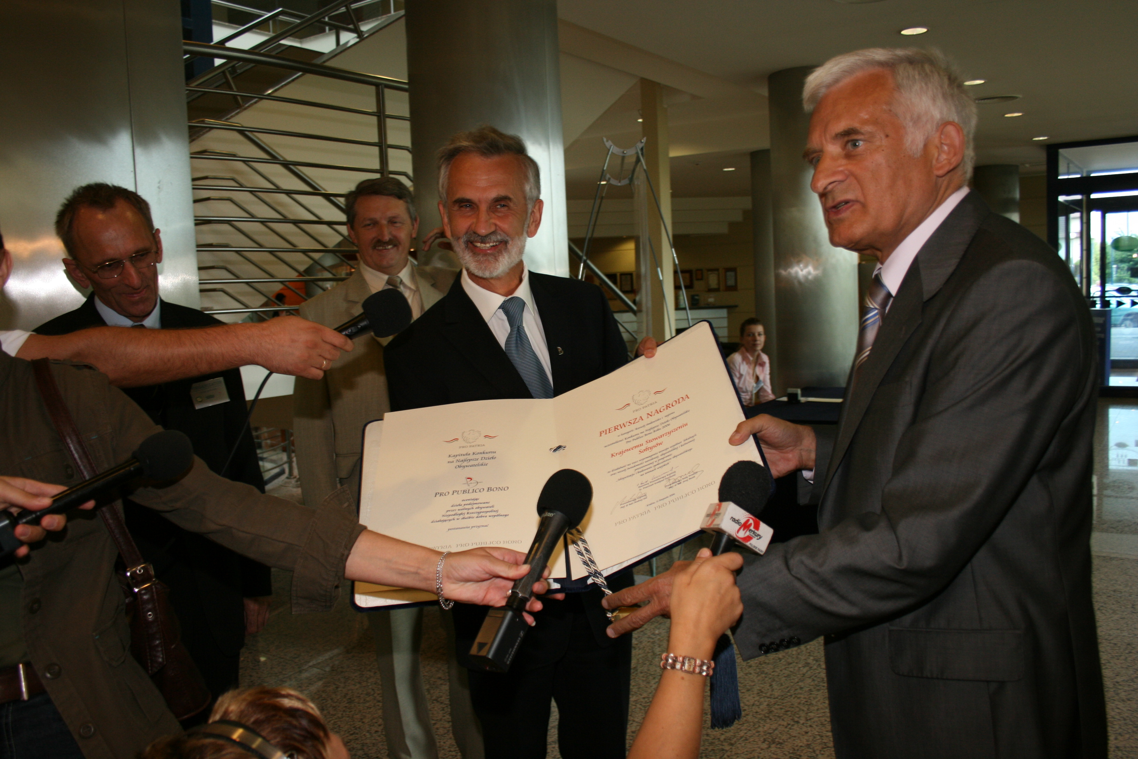 Za swoją działalność KSS otrzymało nagrodę w konkursie ,,Pro publico bono""